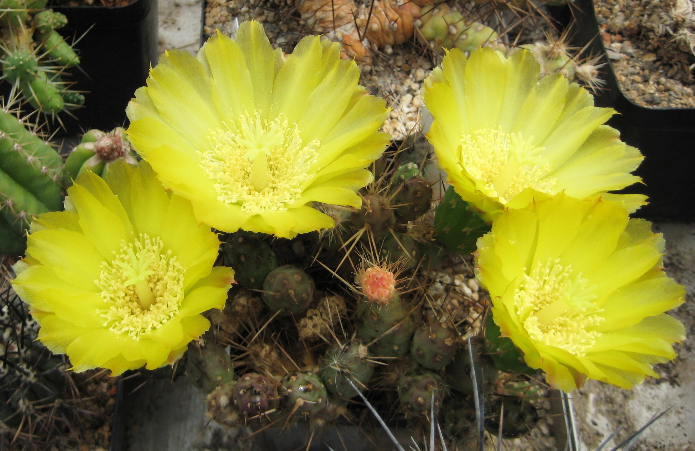 Maihueniospsis ovata in Kultur